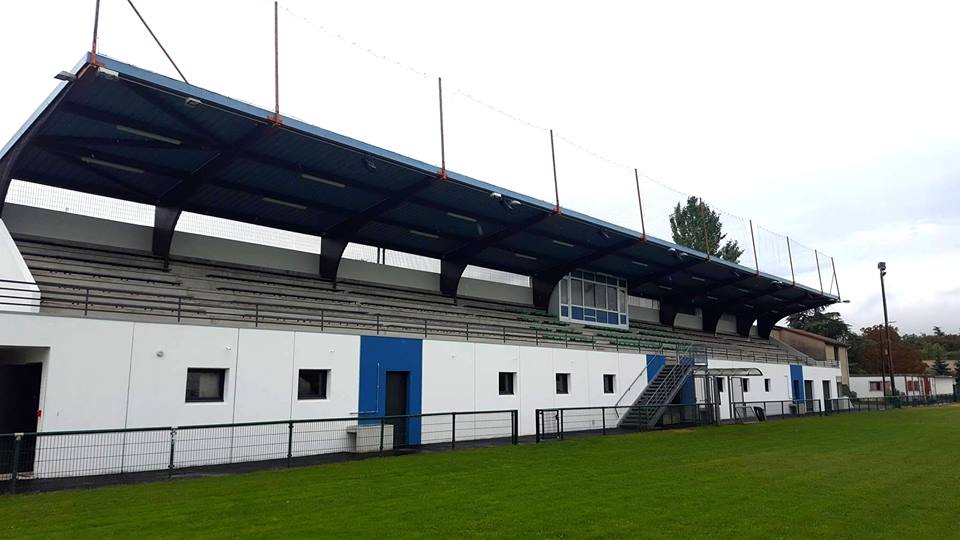 Stade des Baumes Valence